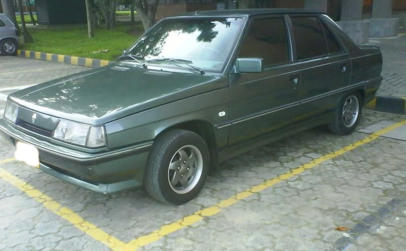 R9 maximo con motor de 1565c.c.